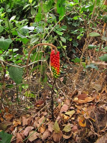 Buah A. variabilis pada tongkol